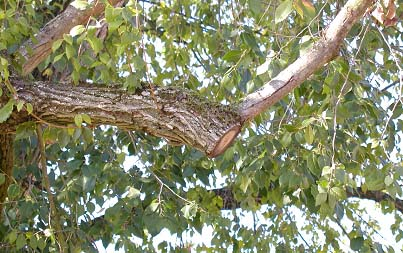 Schnitt auf Zugast